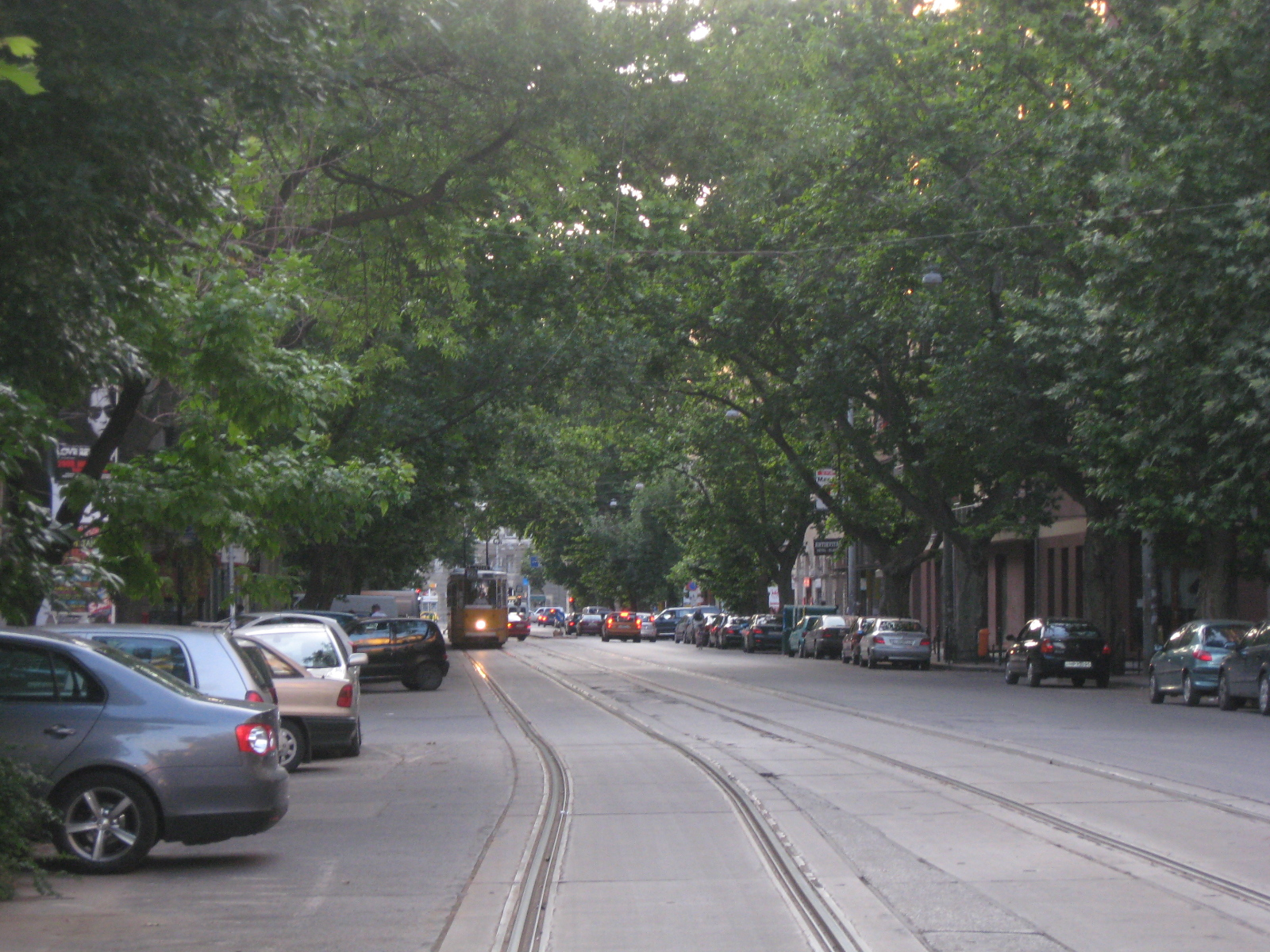 Mester street in Budapest